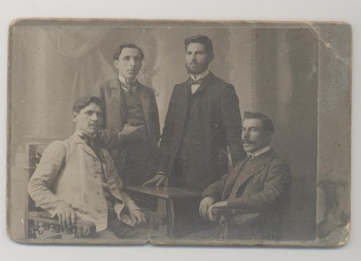 Димитър Запрянов (първи), Георги Занков (втори). От останалите двама единият е Марков от Долна Джумая, а другият - Хасарджиев.